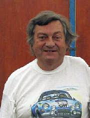 Photo de Jean-Luc Thérier, pilote automobile